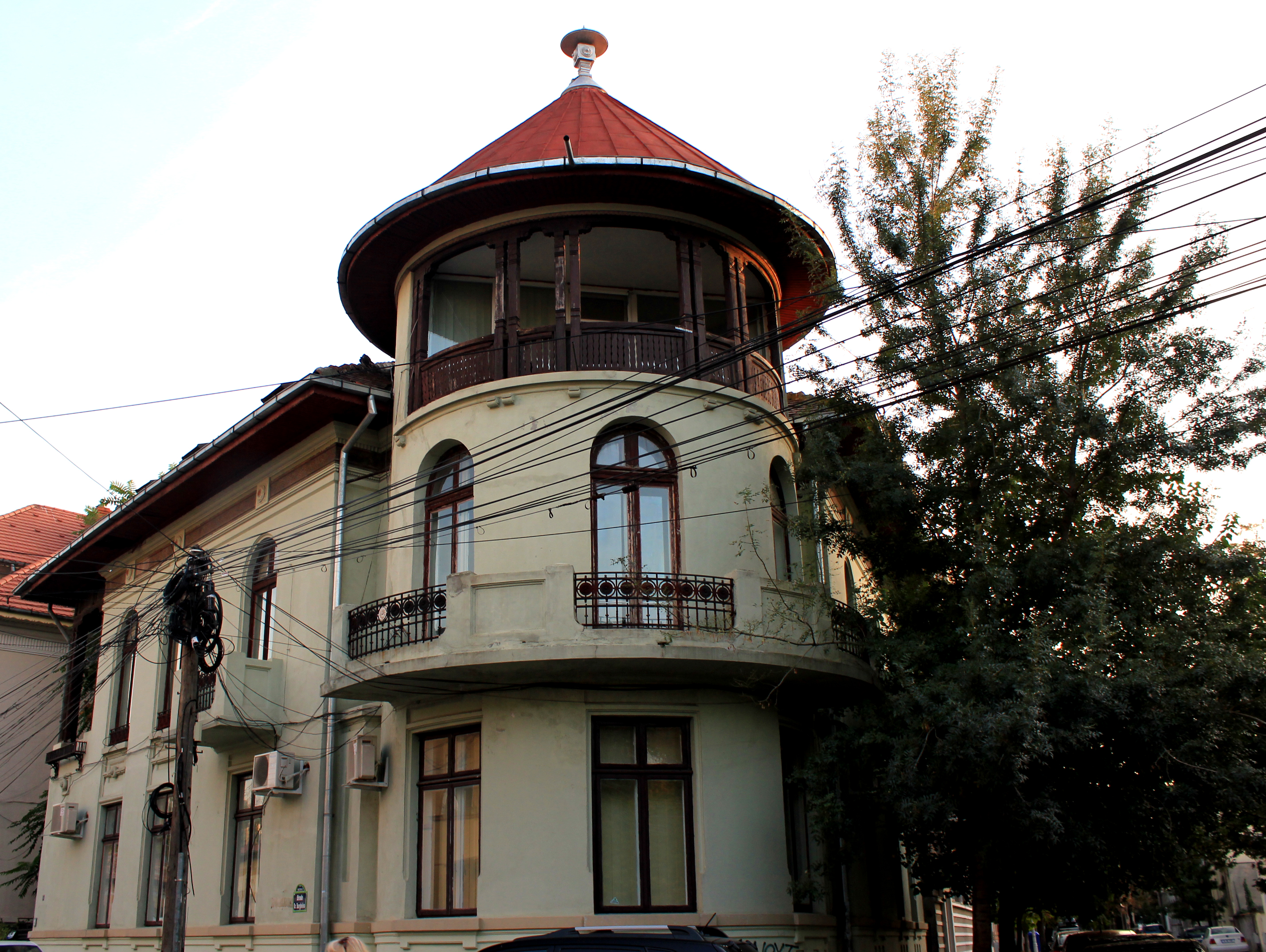 Casa Burghelea 14